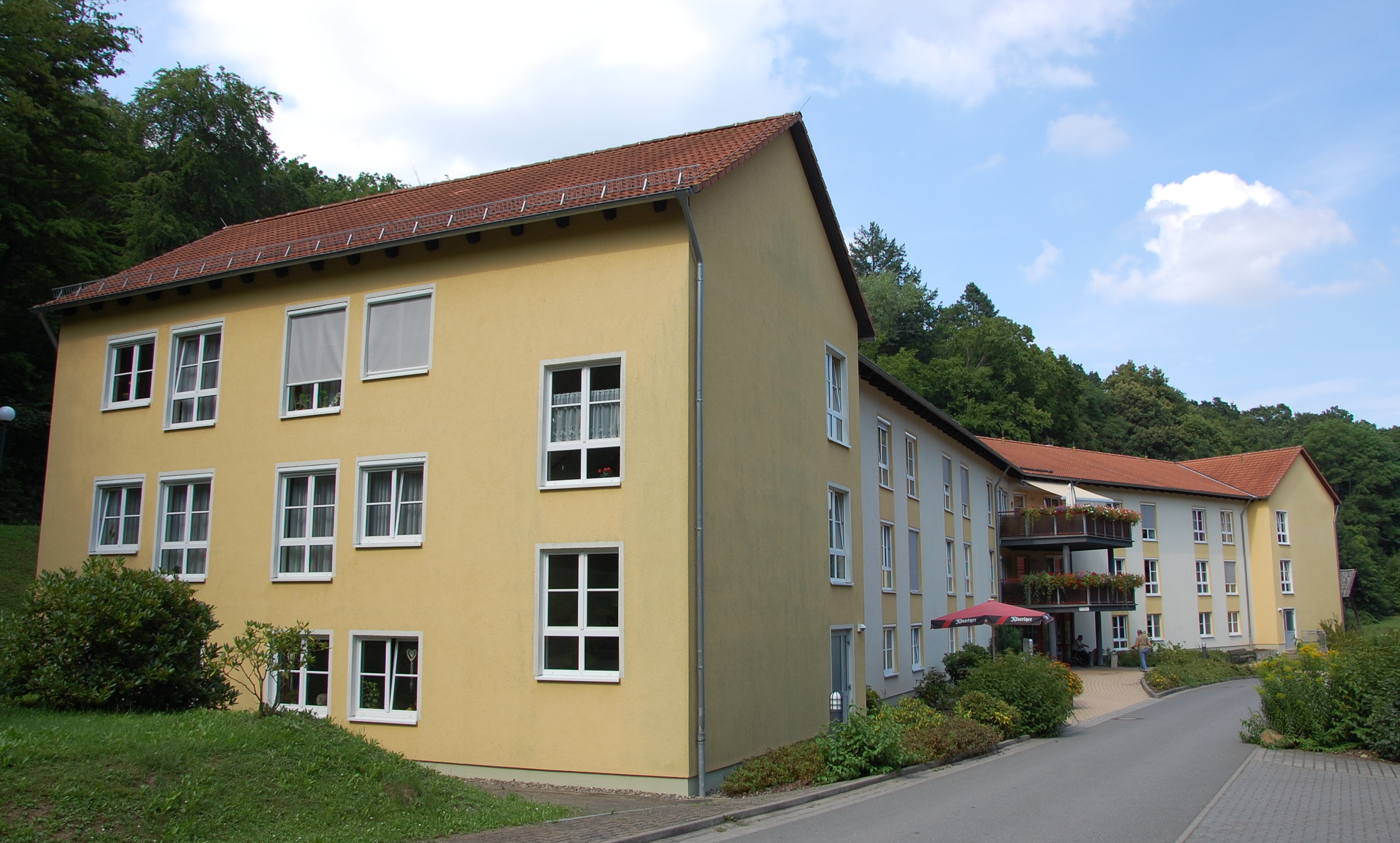 Hagental 12-16 (Gernrode) Ersatzneubau